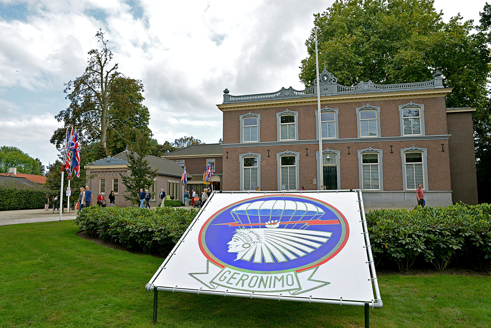 Voormalig hoofdkwartier van het 501st Parachute Infantry Regiment (101st Airborne Division) 'Villa Klondike' tijdens de herdenking van Operation Market Garden in Veghel, 2014. De villa stond voor de Tweede Wereldoorlog bekend als 'Huize Rustplaats'.